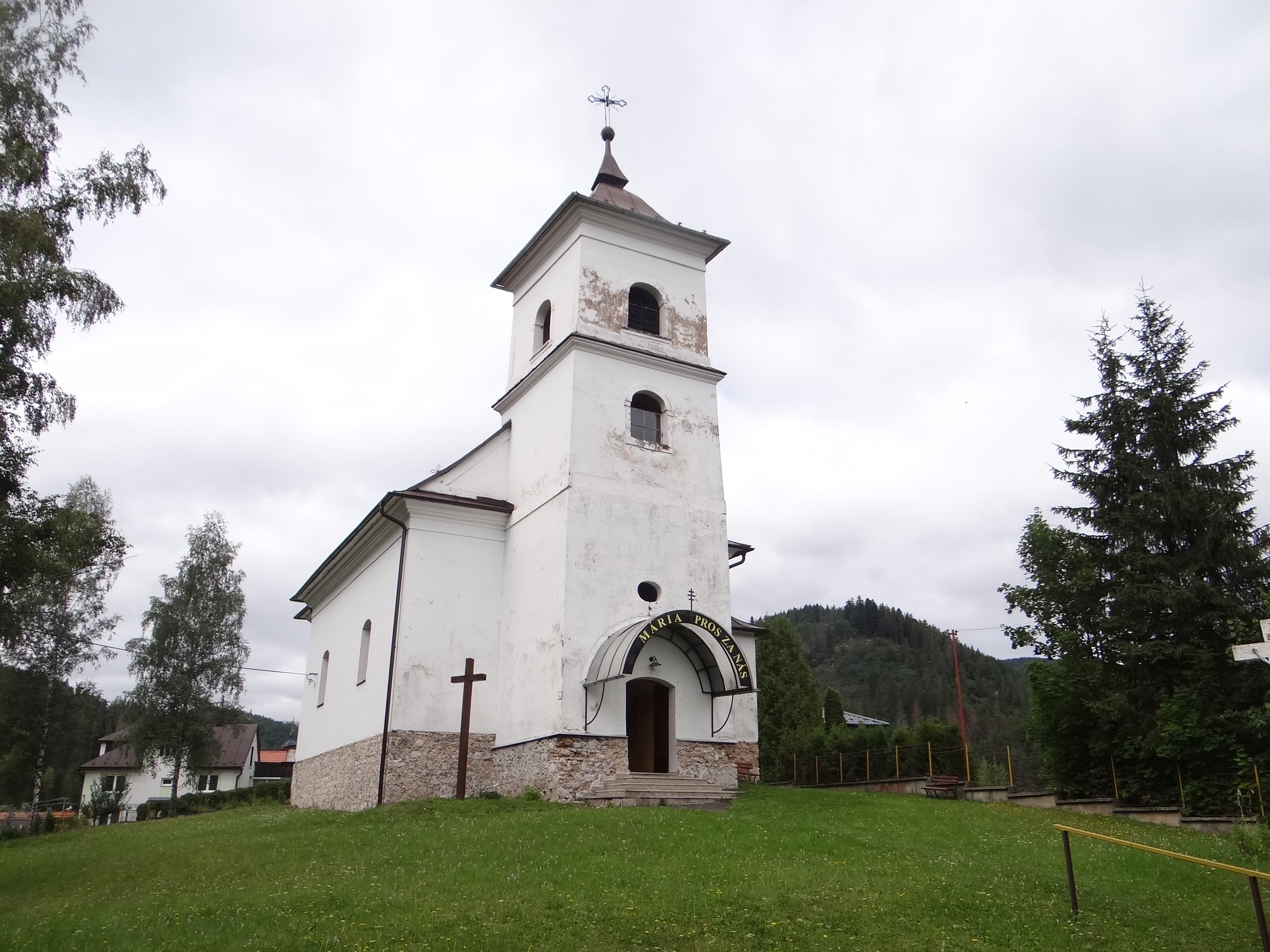 Vernár, kostol